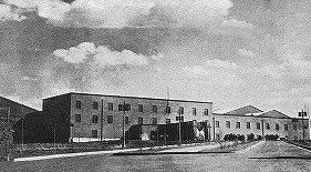 Film Association Studio of Manchukuo（满洲映画协会）